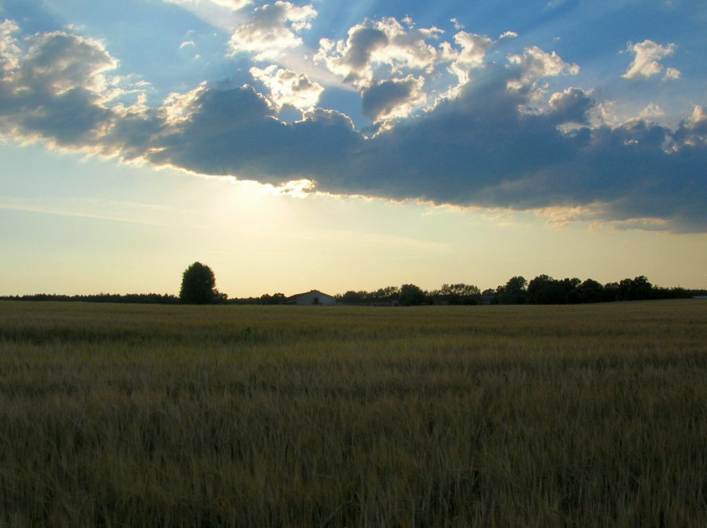 Wysoczyzna Świecka - pola k. Jarużyna